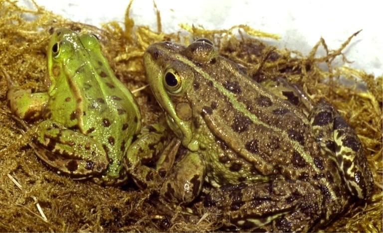 Beschreibung: Zwei Teichfrösche (Rana kl. esculenta), die die ganze Variationsbreite dieses Taxons zeigen: Links ein mutmaßlich triploides, Rana-lessonae-ähnliches Exemplar, rechts ein wohl ebenfalls triploides, aber Rana ridibunda-dominantes Tier (beides Männchen).